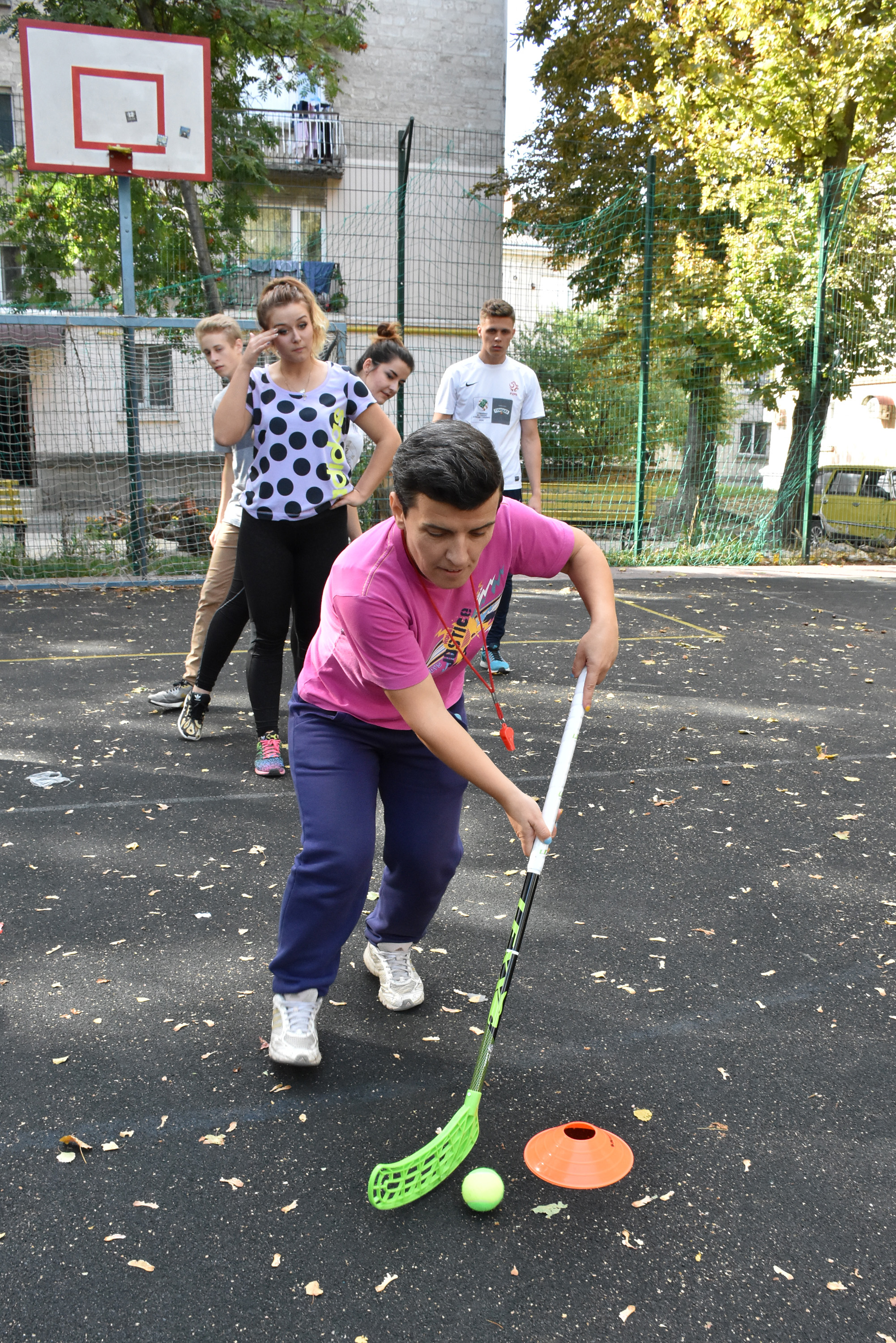 «Веселі старти» для іноземних студентів Тернопільського державного медичного університету імені І. Я. Горбачевського на спортивному майданчику Тернопільського фіздиспансеру на вул. Старий Ринок проводить українська спортсменка, тренер, громадська діячка Лілія Проць.